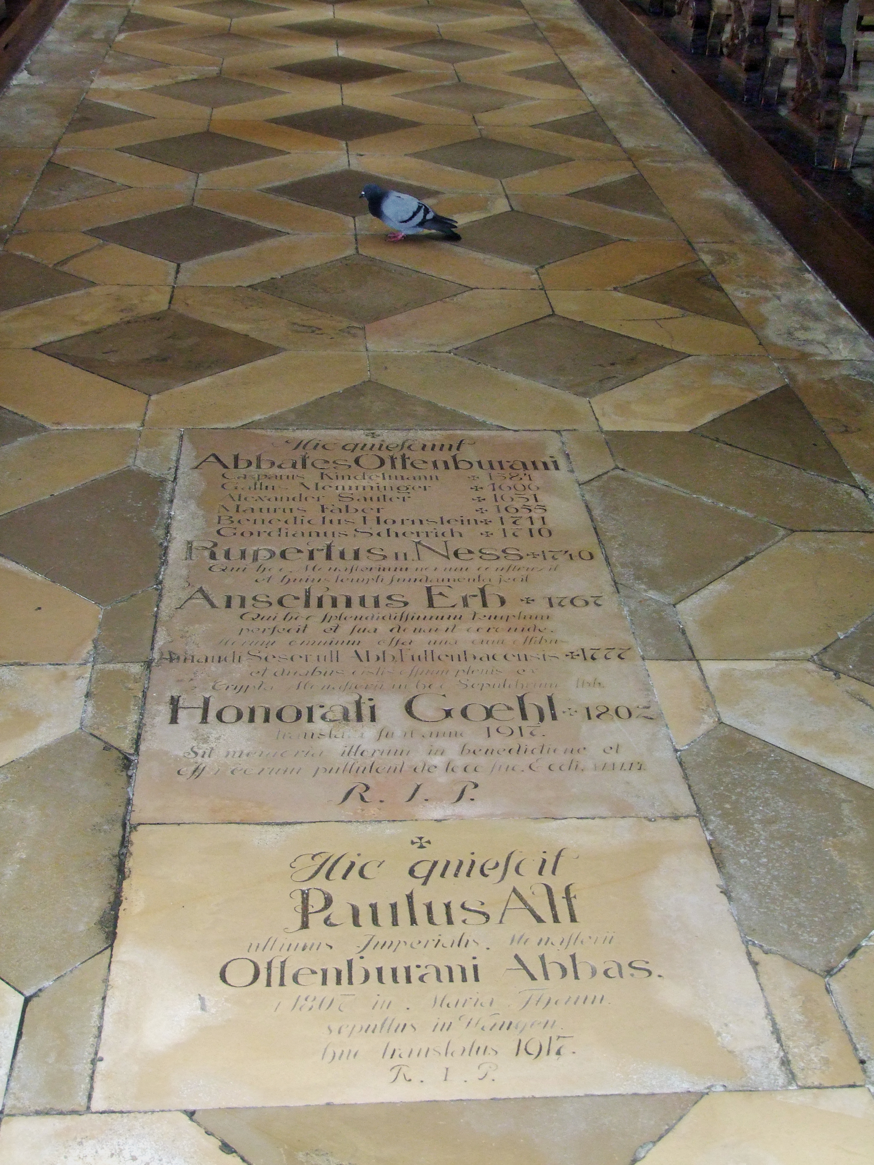 Gruftplatten der verstorbenen Äbte vom Kloster Ottobeuren im nördlichen Teil des Hauptschiffes, Basilika Ottobeuren